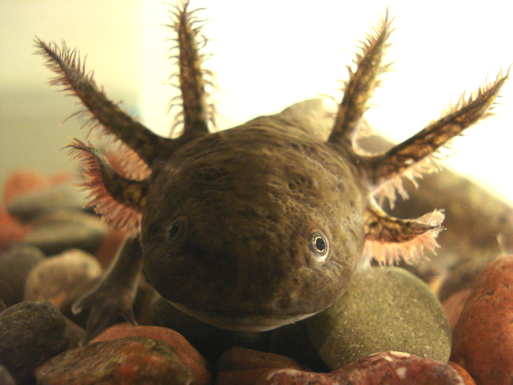 fotografía de mi axolote llamado jimmy cachoi